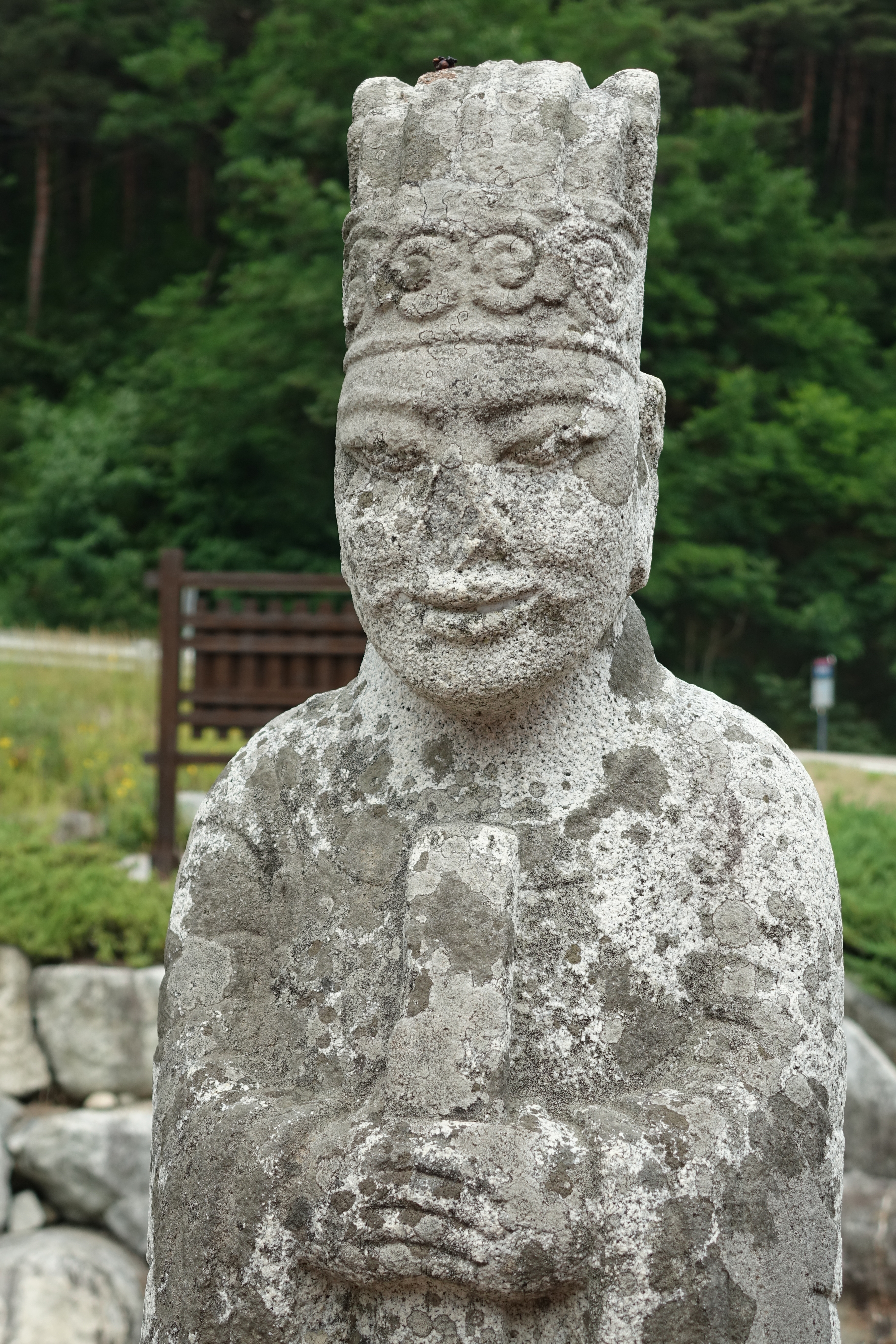 최광모 촬영 사진 (Photos taken by Choe Kwangmo)